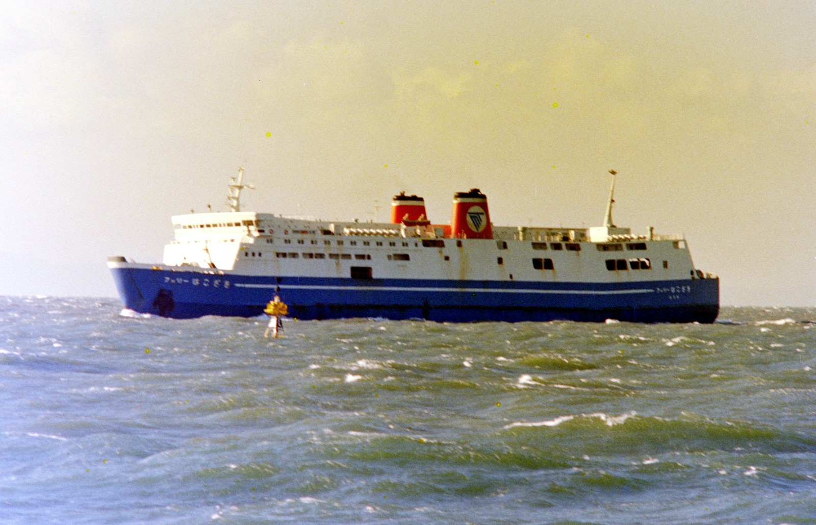 大阪港外を航行する名門大洋フェリー・フェリーはこざき